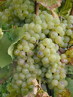 Gutedel Weintrauben, typische Rebsorte des Markgräflerlandes Camera: Nikon Coolpix 950 Software: GIMP